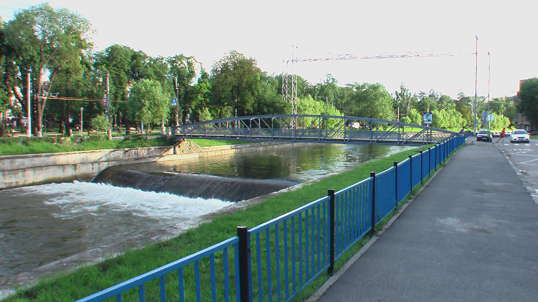 ClujNapocaSomeșul Mic